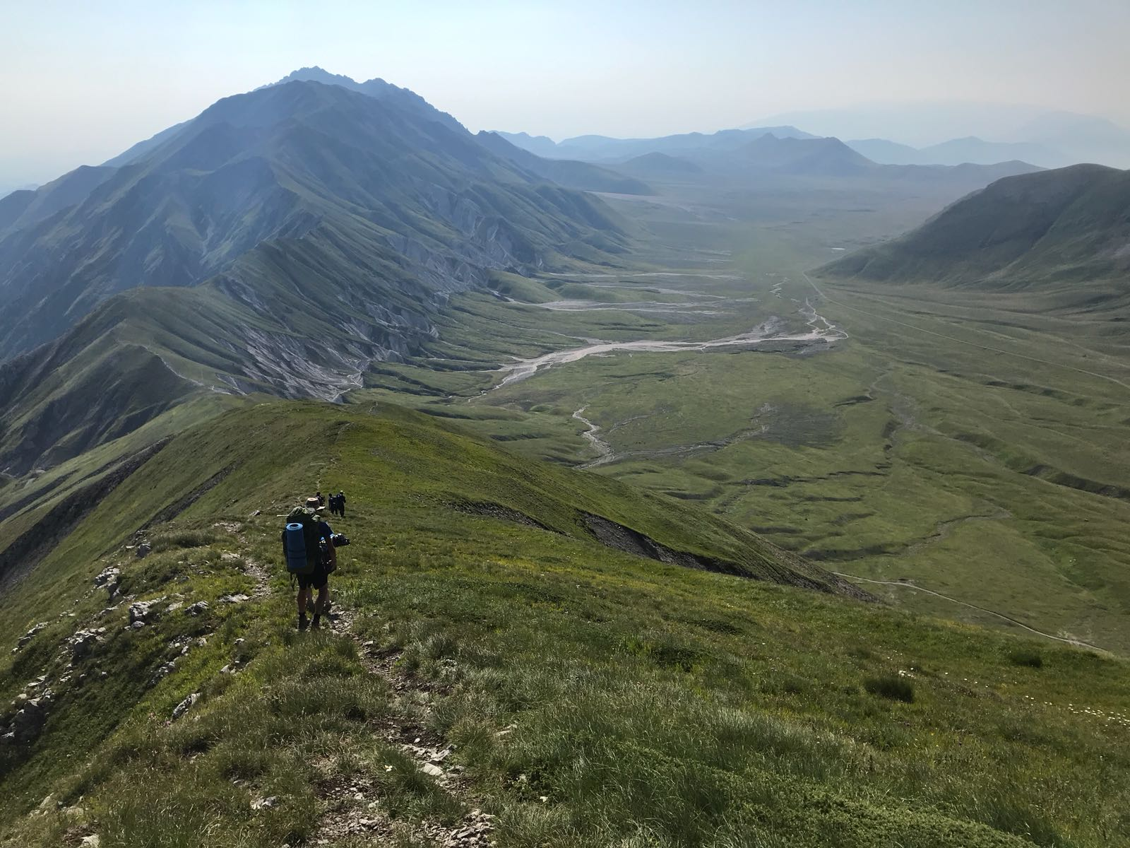 parco nazionale del Gran Sasso e Monti della Laga (Q1027914)